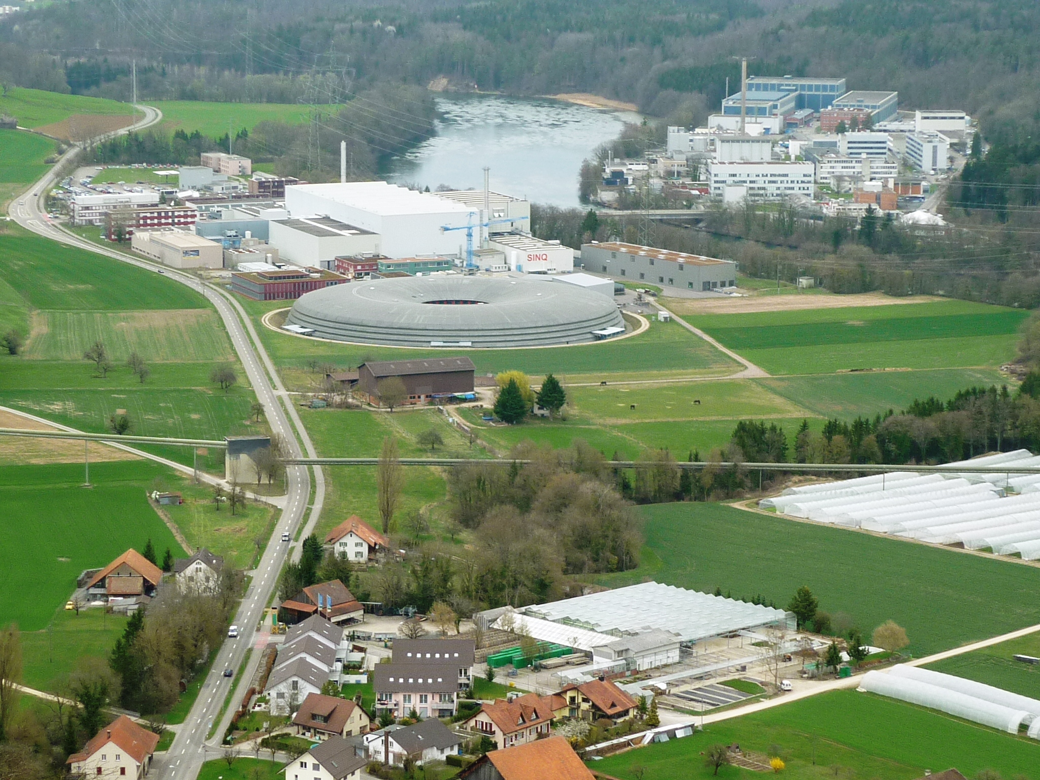 Villigen AG, Schweiz